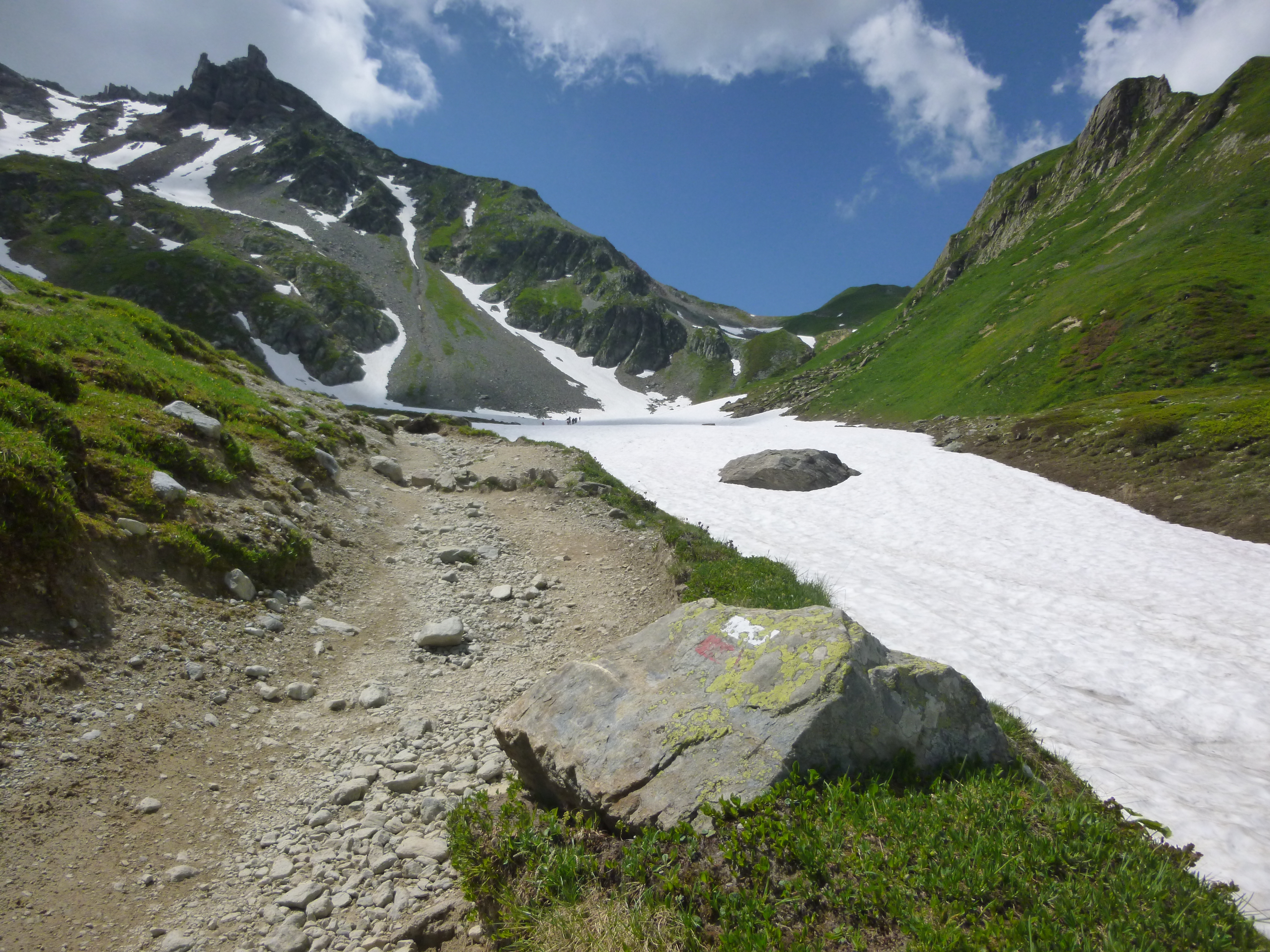 Balise GR sur le GR5 et le TMB